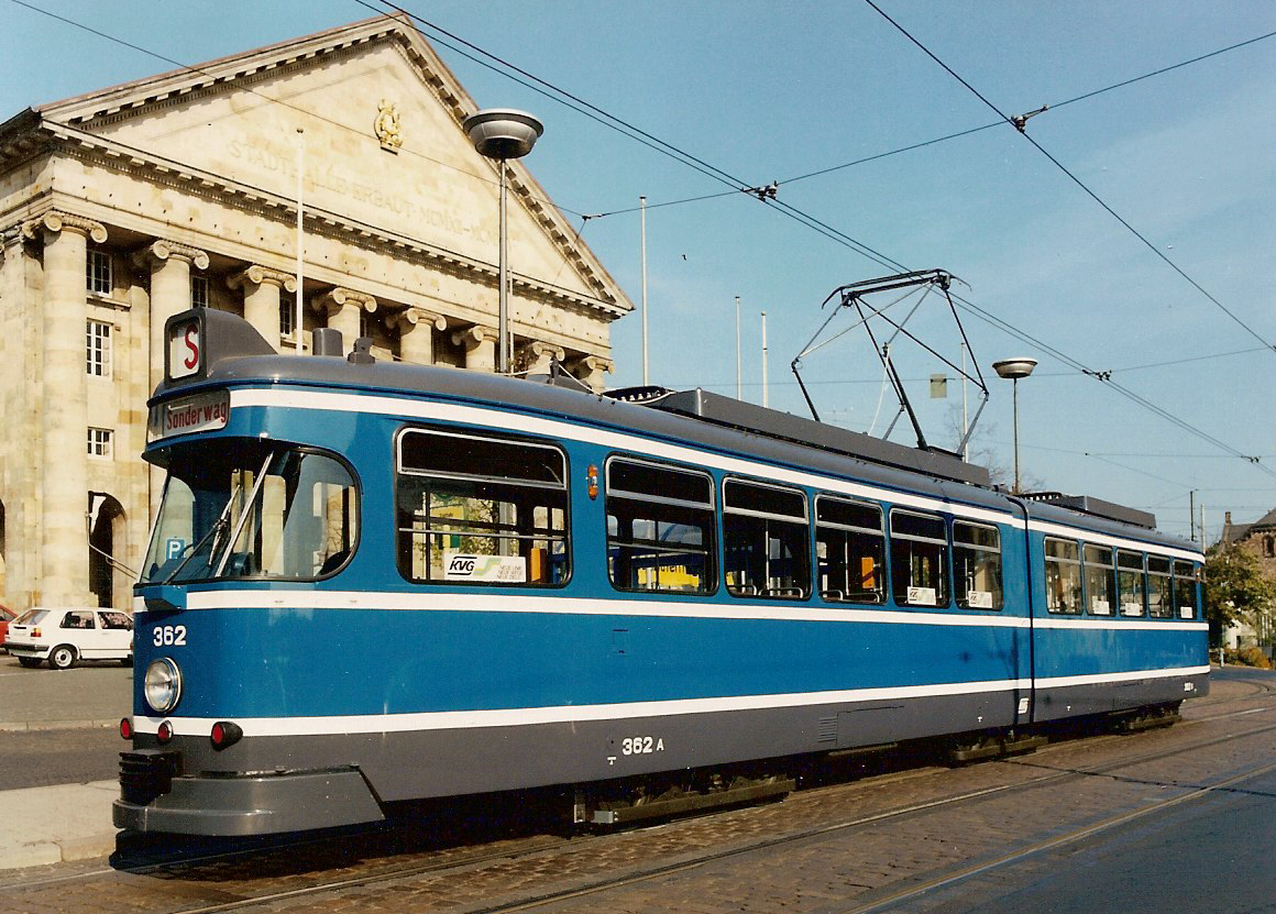 Summary Bildbeschreibung: Kasseler Straßenbahntriebwagen 362 Bj. 1971 vor der Stadthalle Quelle: eigene Photographie Fotograf/Zeichner: Benutzer:Carroy Datum: Sommer 1997 Sonstiges: ...